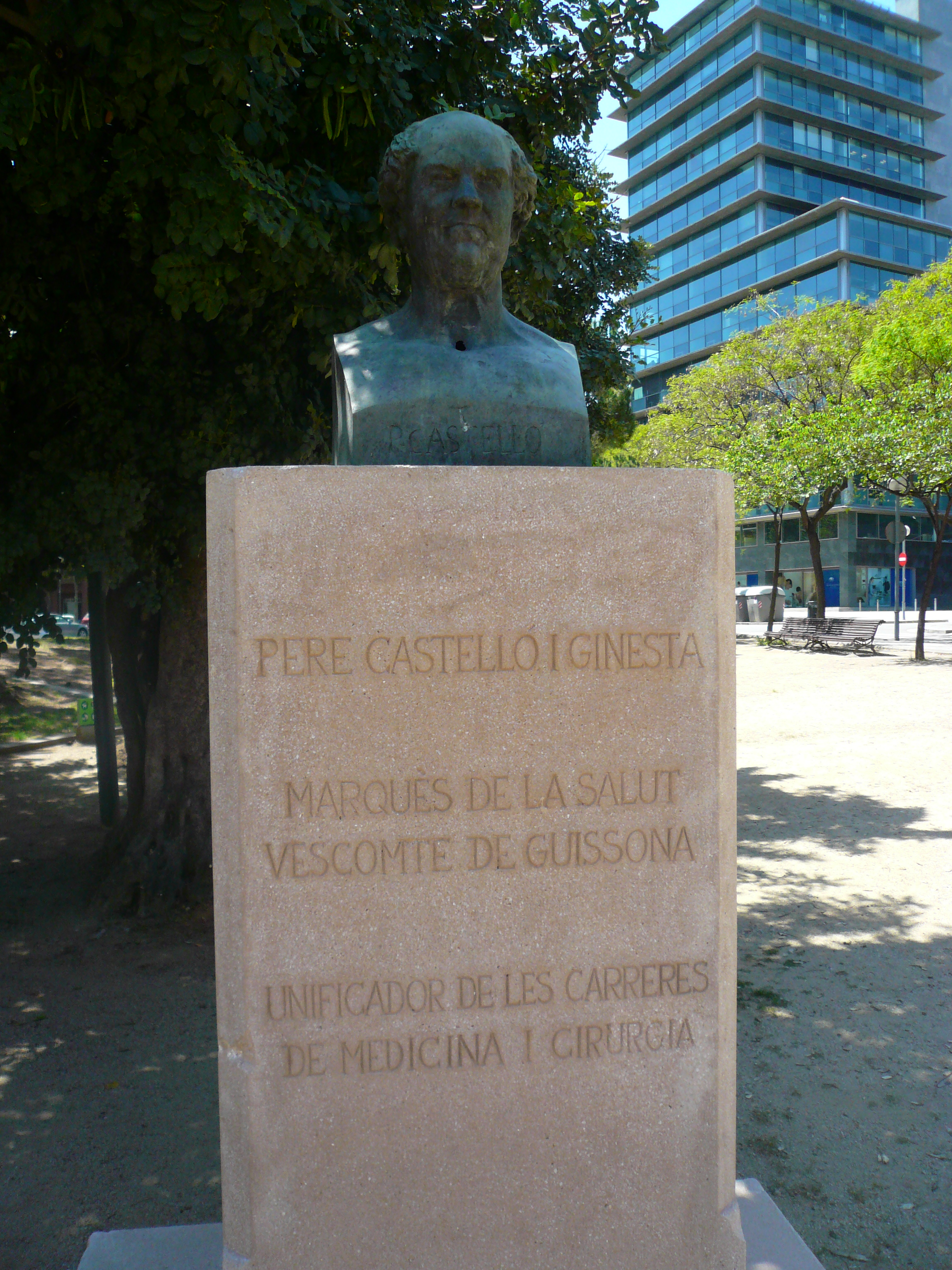 A Pere Castelló. Pl. Pere Castelló (Barcelona). Escultor: Ponciano Ponzano, signada com "Ponciano Zaragozano". Material: bronze sobre base de pedra de Montjuïc. Còpia d'un original del segle XIX. 1994. 34″ N, 2° 08′ 08.05″ E